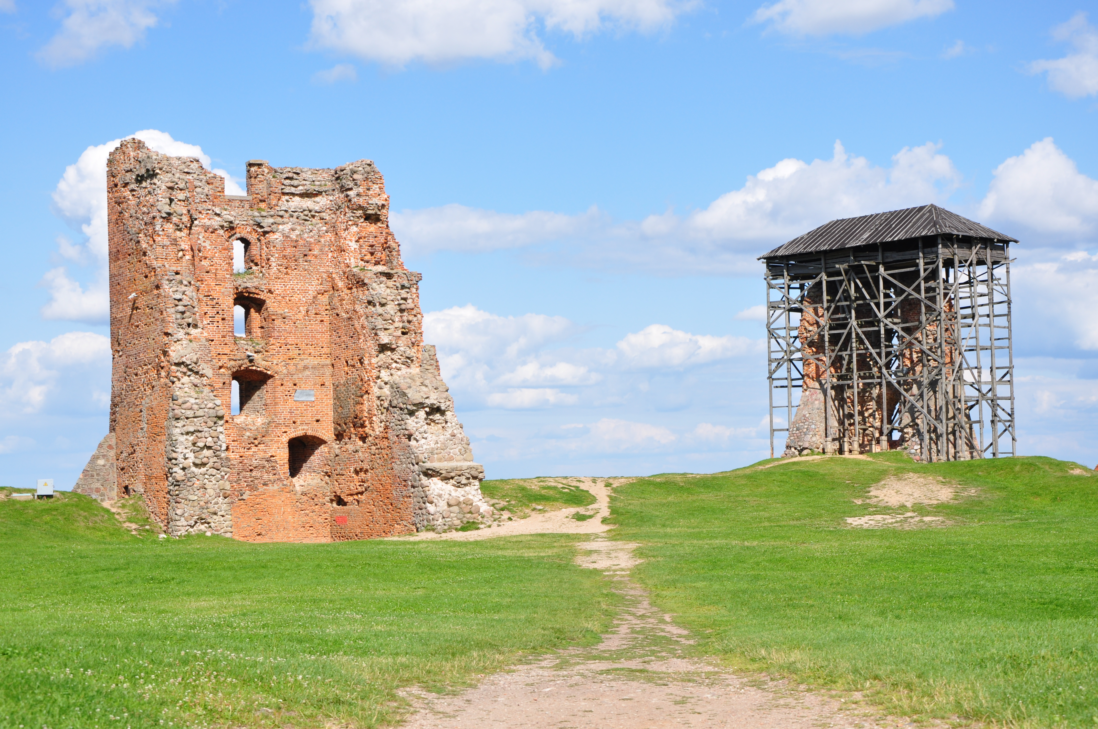 Рэшткі замка. г. Наваградак This is a photo of Belarusian heritage monument. Reference number: 411Г000404 ( WLM)